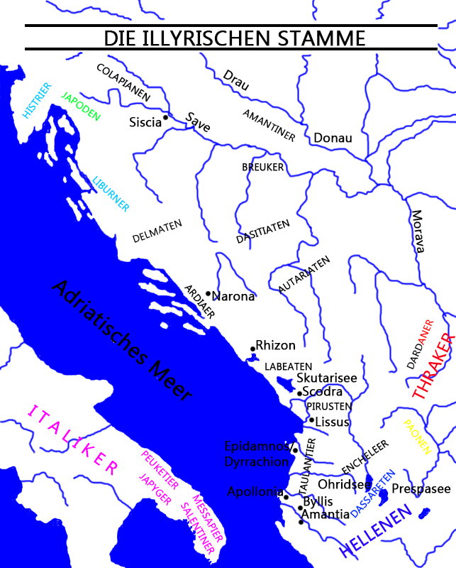 Die Illyrischen Stamme carte des tribus illyriennes illyrische Stamme Karte Mappa di tribu illiriche mapa de tribos ilirias Mapa Ilirske plemena mapa de las tribus de Illyrian Fiset ilire harte Χάρτης Ιλλυριών φυλών Карта из иллирийских племен Мапа илирског племена